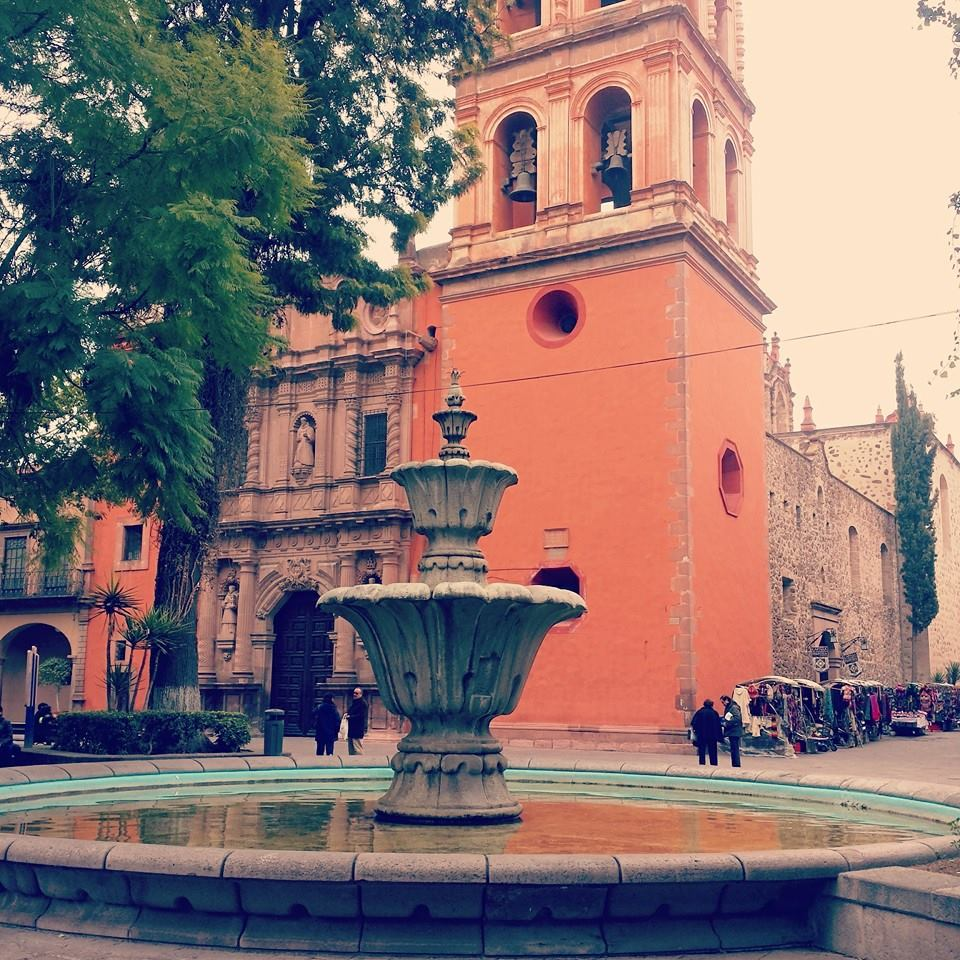 Plaza de San Francisco